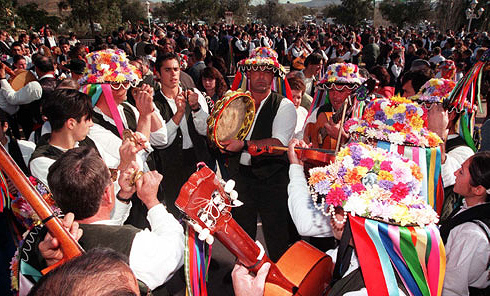 Panda de Verdiales actuando en el Festival de San Cayetano